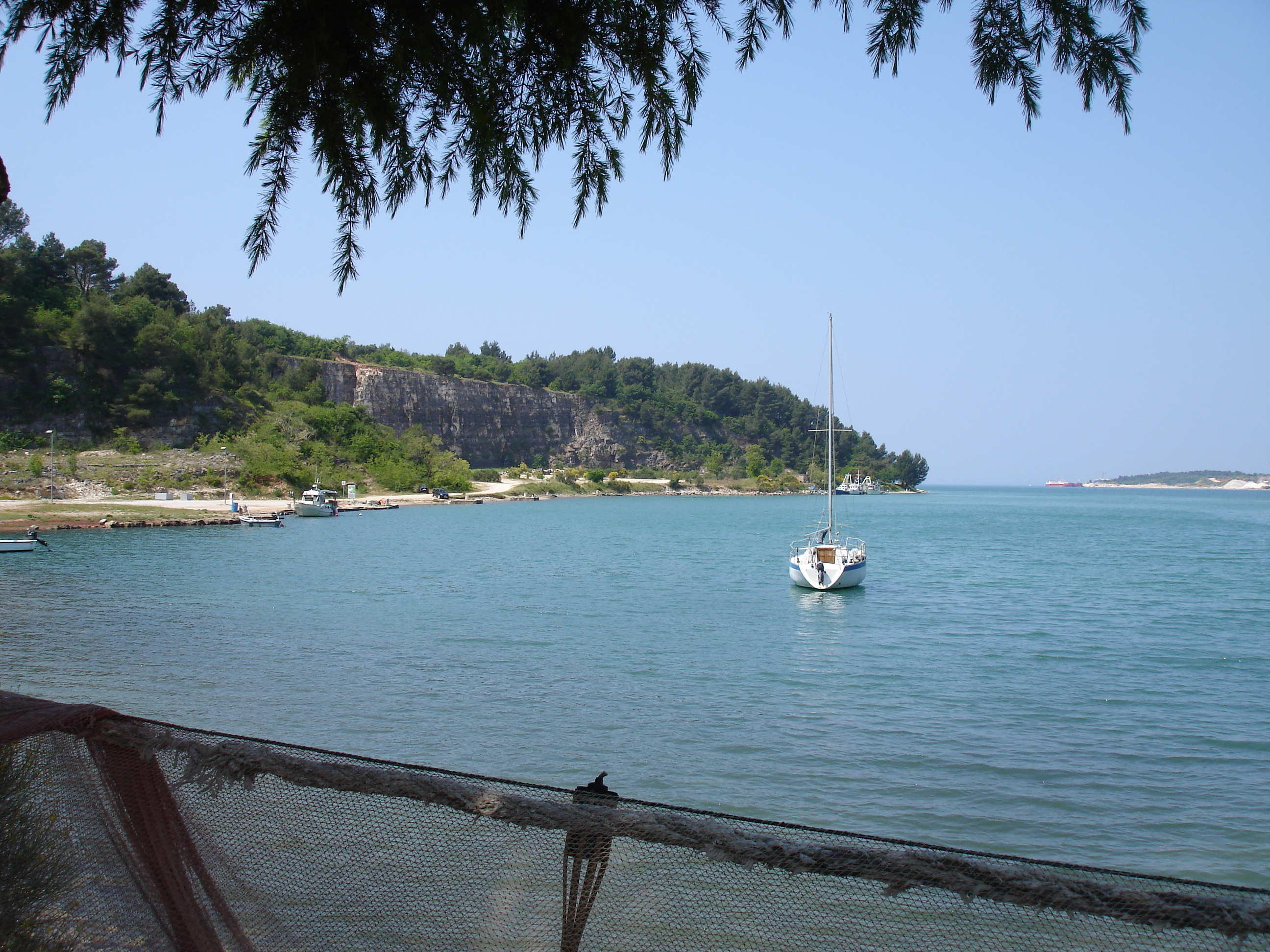 Tarska vala, pogled prema zapadu